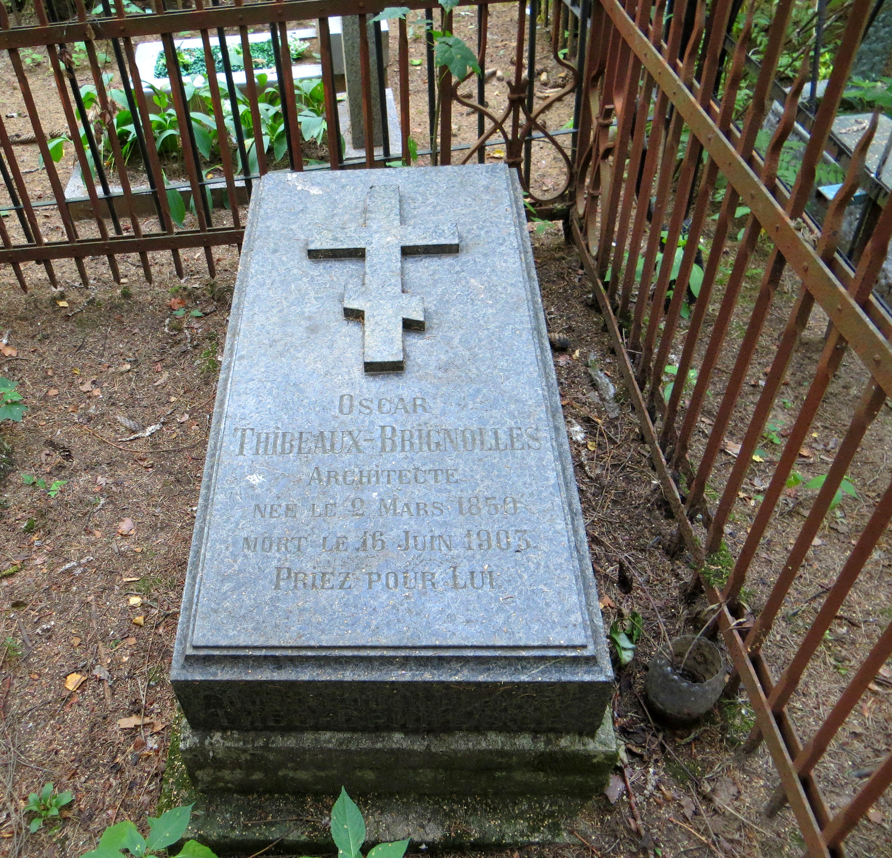 Могила Оскара Тибо-Бриньоля на Рябовском кладбище в г. Всеволожске.